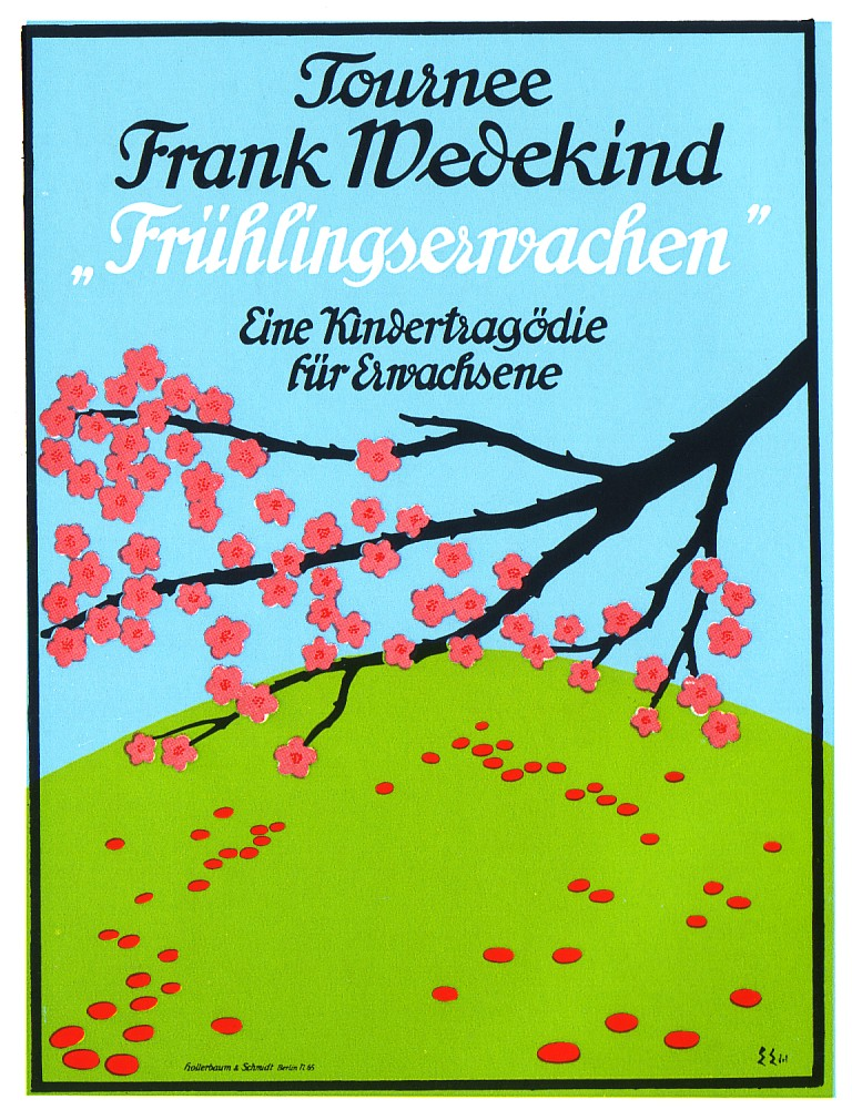 Plakat für Frank Wedekinds Tragödie "Frühlingserwachen".